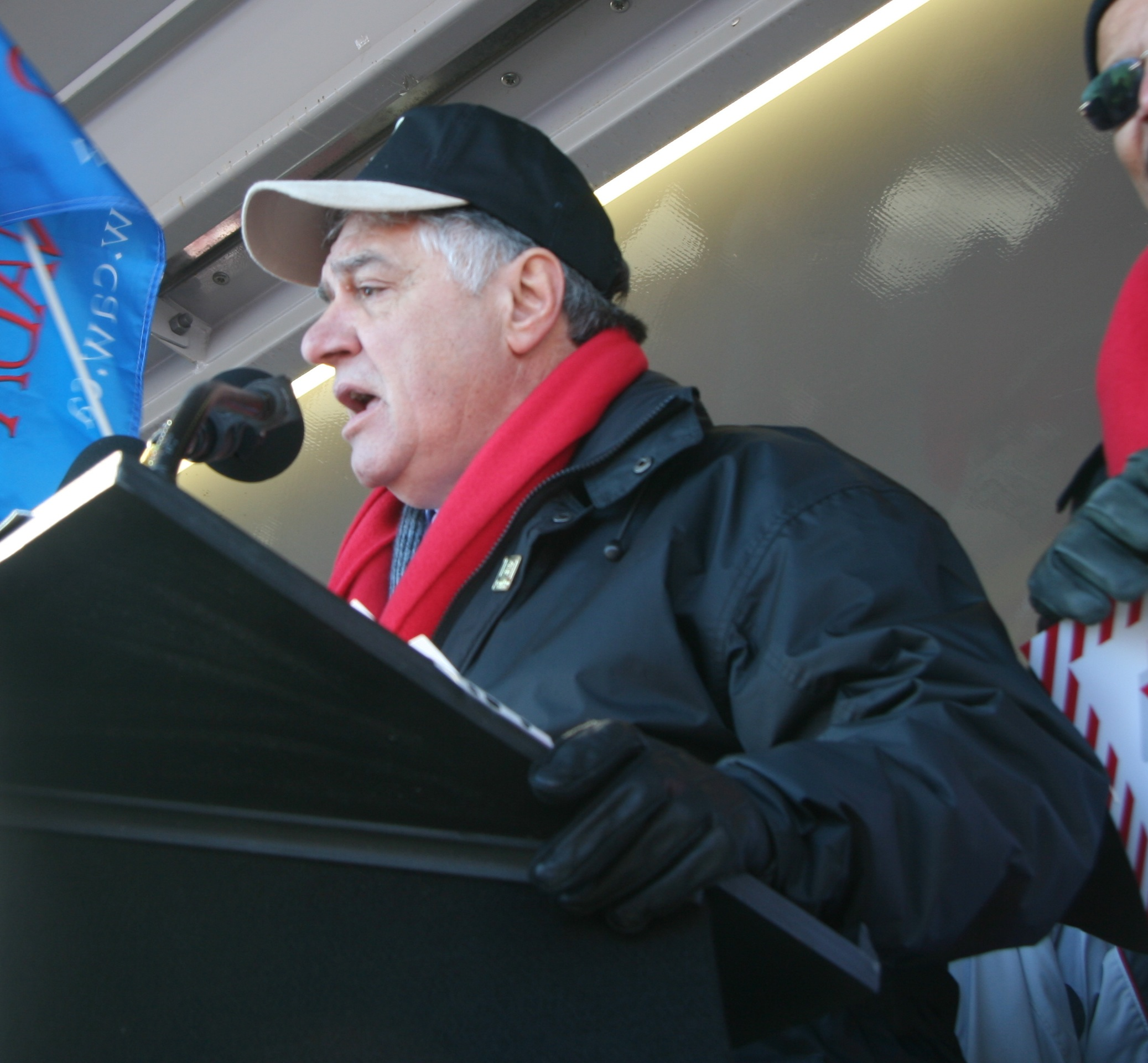 London Mayor Joe Fontana